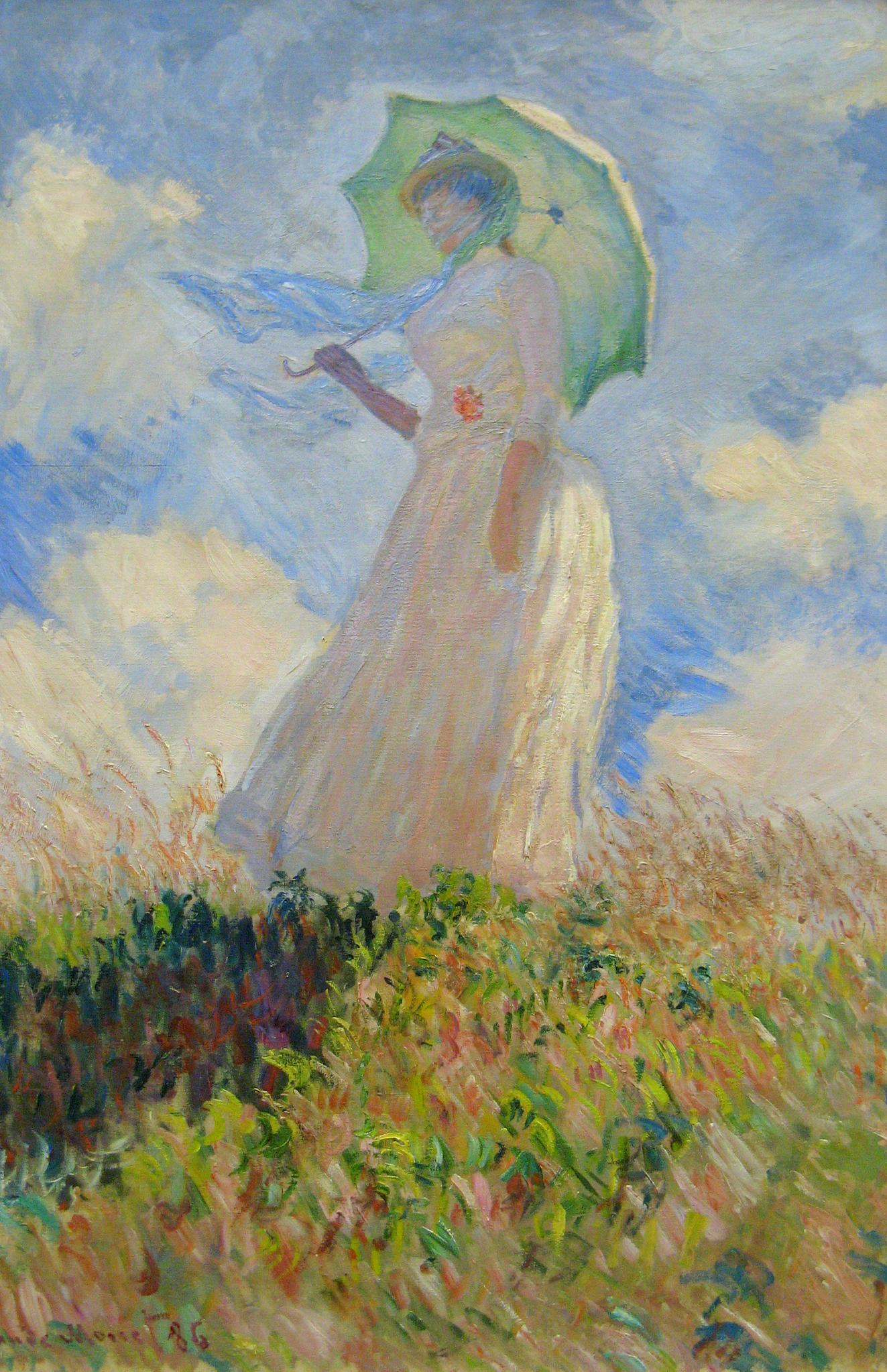 Femme à l'ombrelle tournée vers la gauche.title QS:P1476,fr:"Femme à l'ombrelle tournée vers la gauche." label QS:Lfr,"Femme à l'ombrelle tournée vers la gauche."